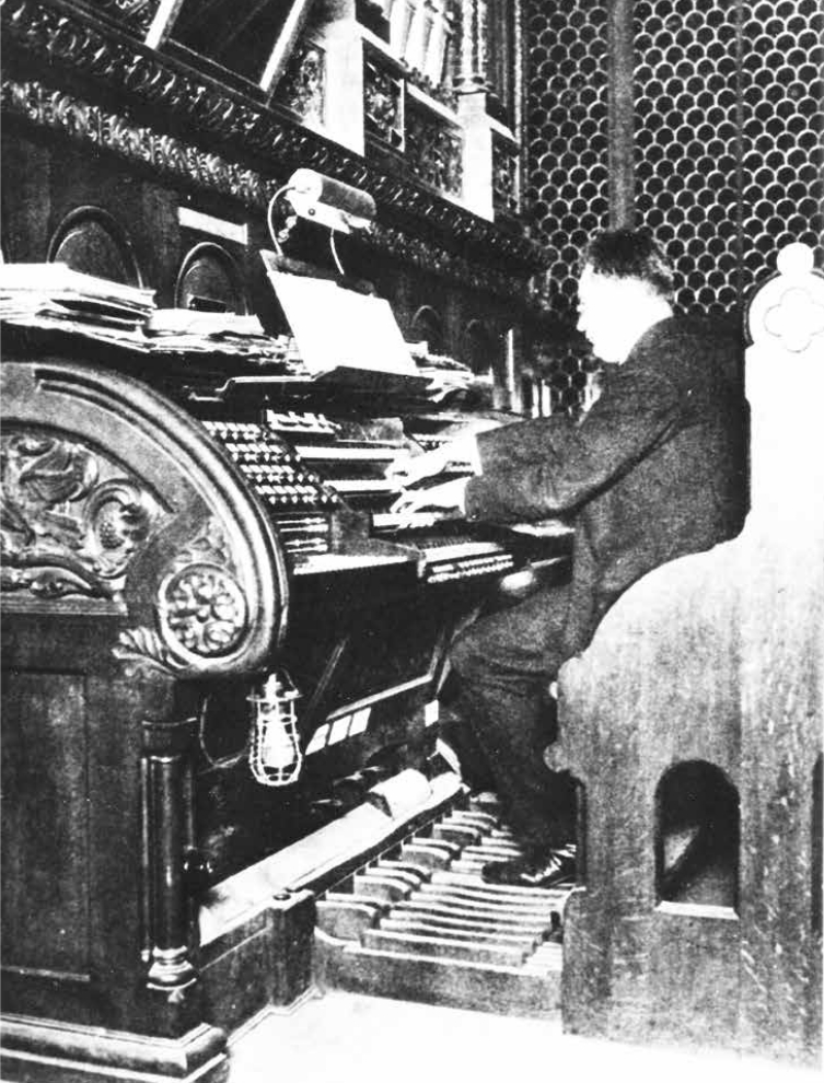 Photograph of Max Reger at the Op 660 Sauer Organ in the Kaiser Wilhelm Gedächtniskirche in Berlin